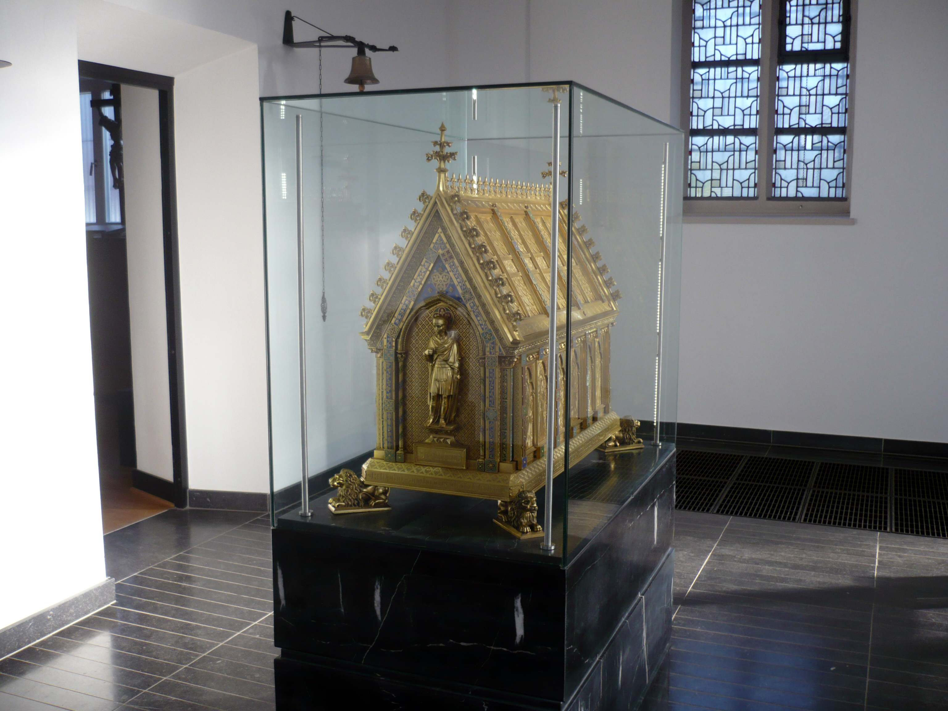 Reliquienschrein der heiligen Galenus und Valenus.